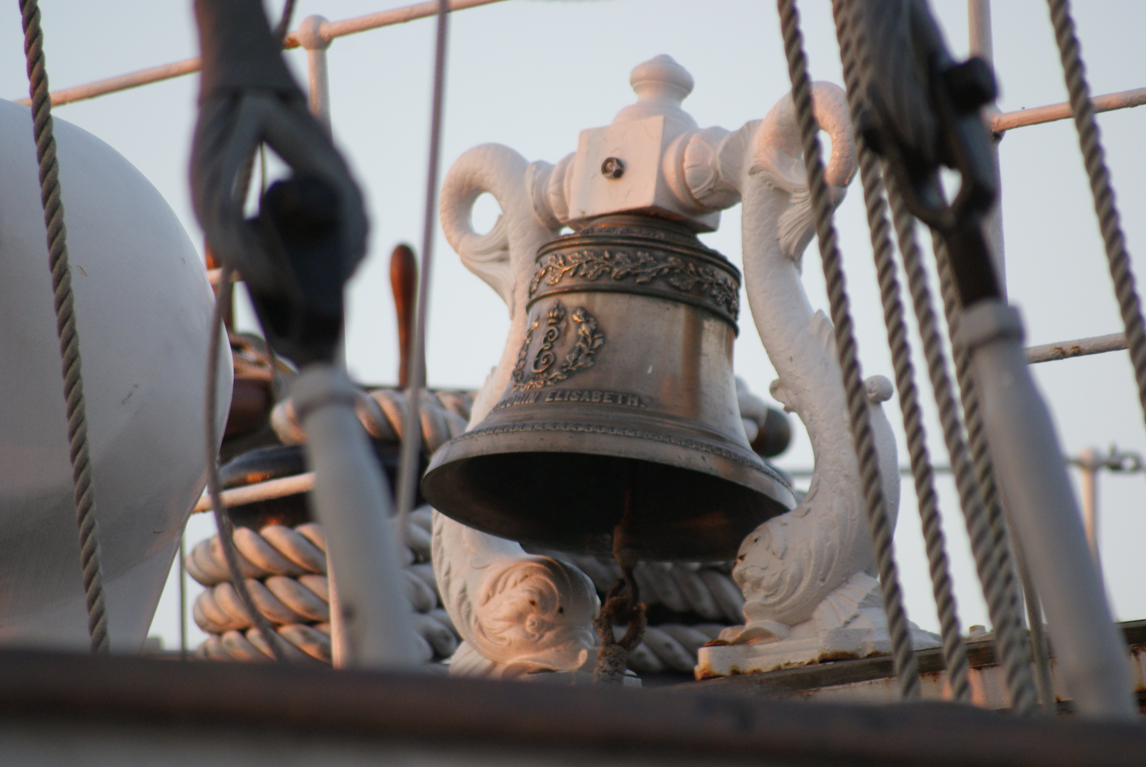 cloche de quart du Trois-mâts carré Duchesse Anne (Musée portuaire de Dunkerque, Nord, France).